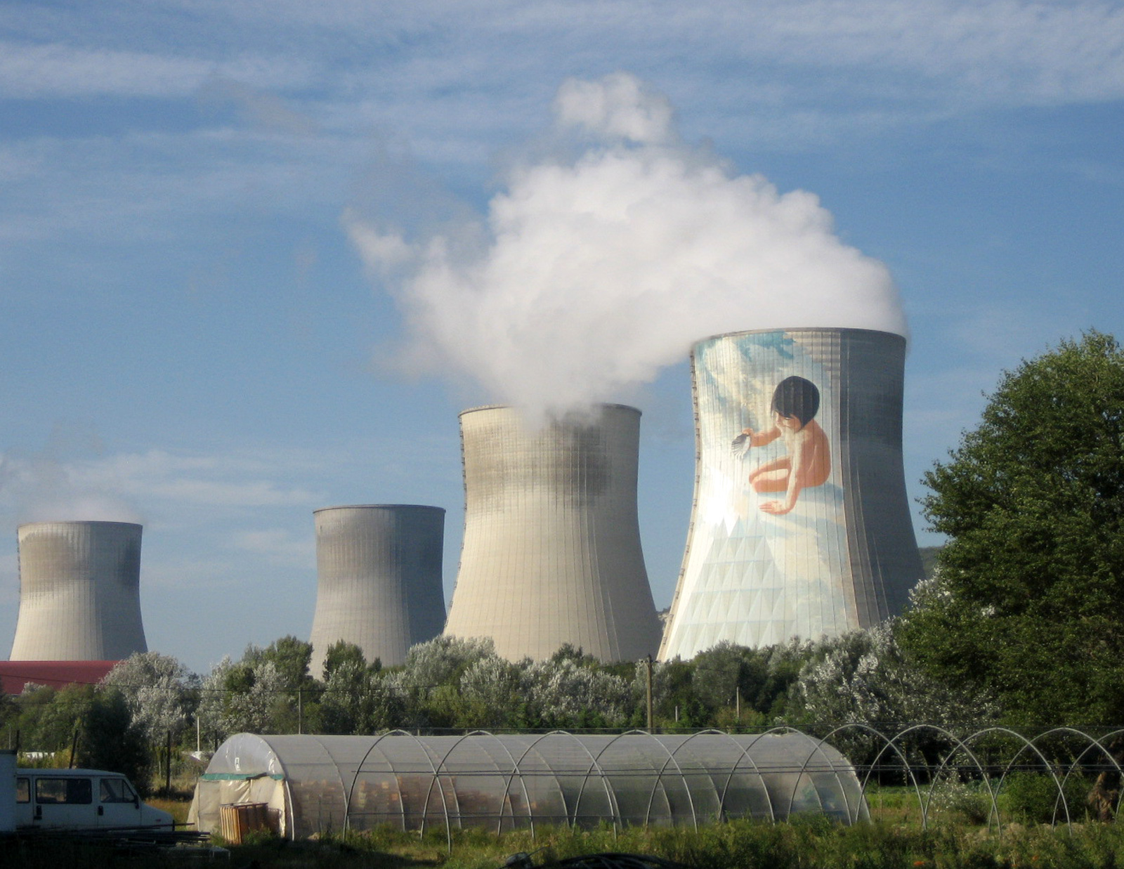 Centrale nucléaire de Cruas (département de l'Ardèche, France)